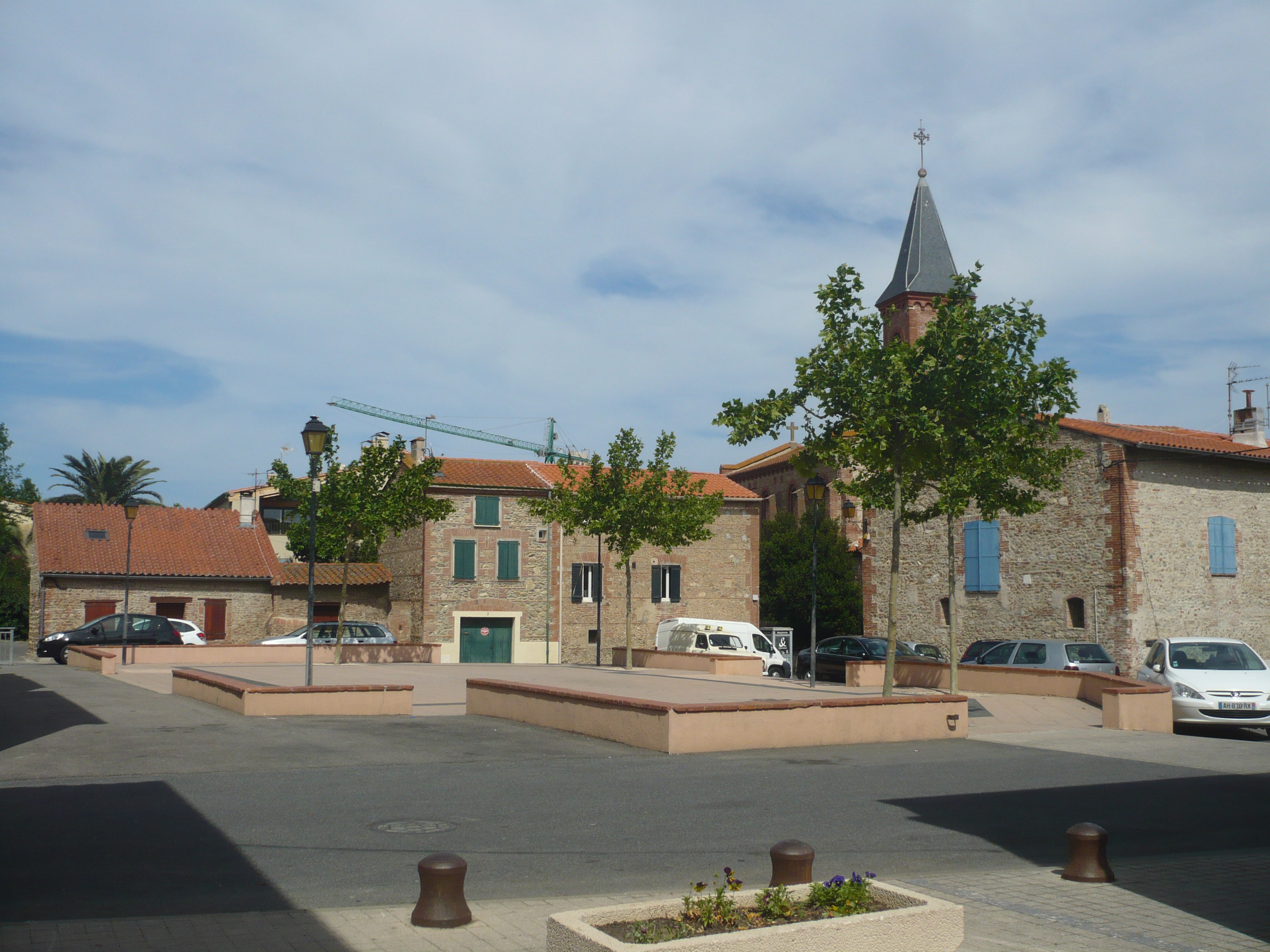 La place du village à Corneilla-del-Vercol